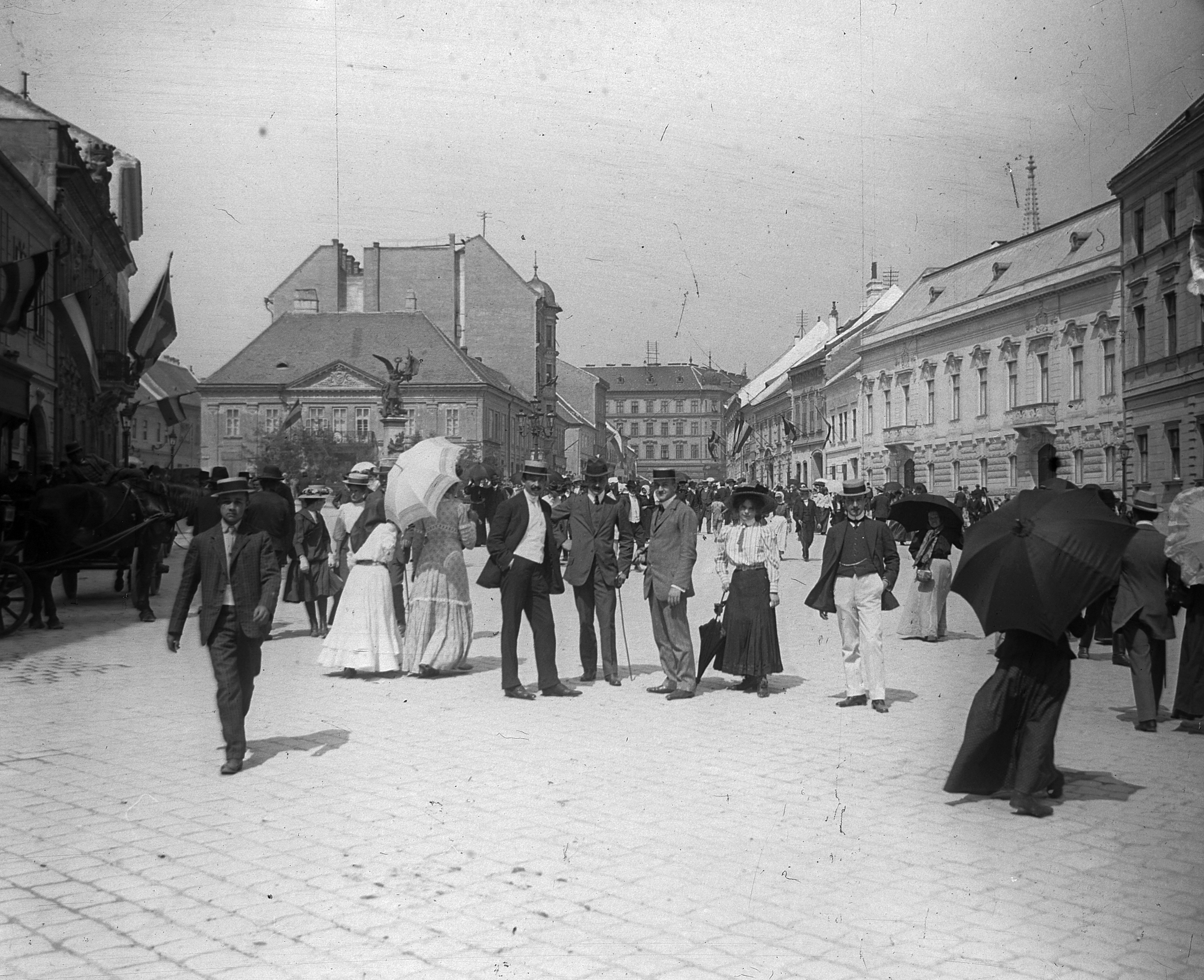 A budapesti Dísz tér.